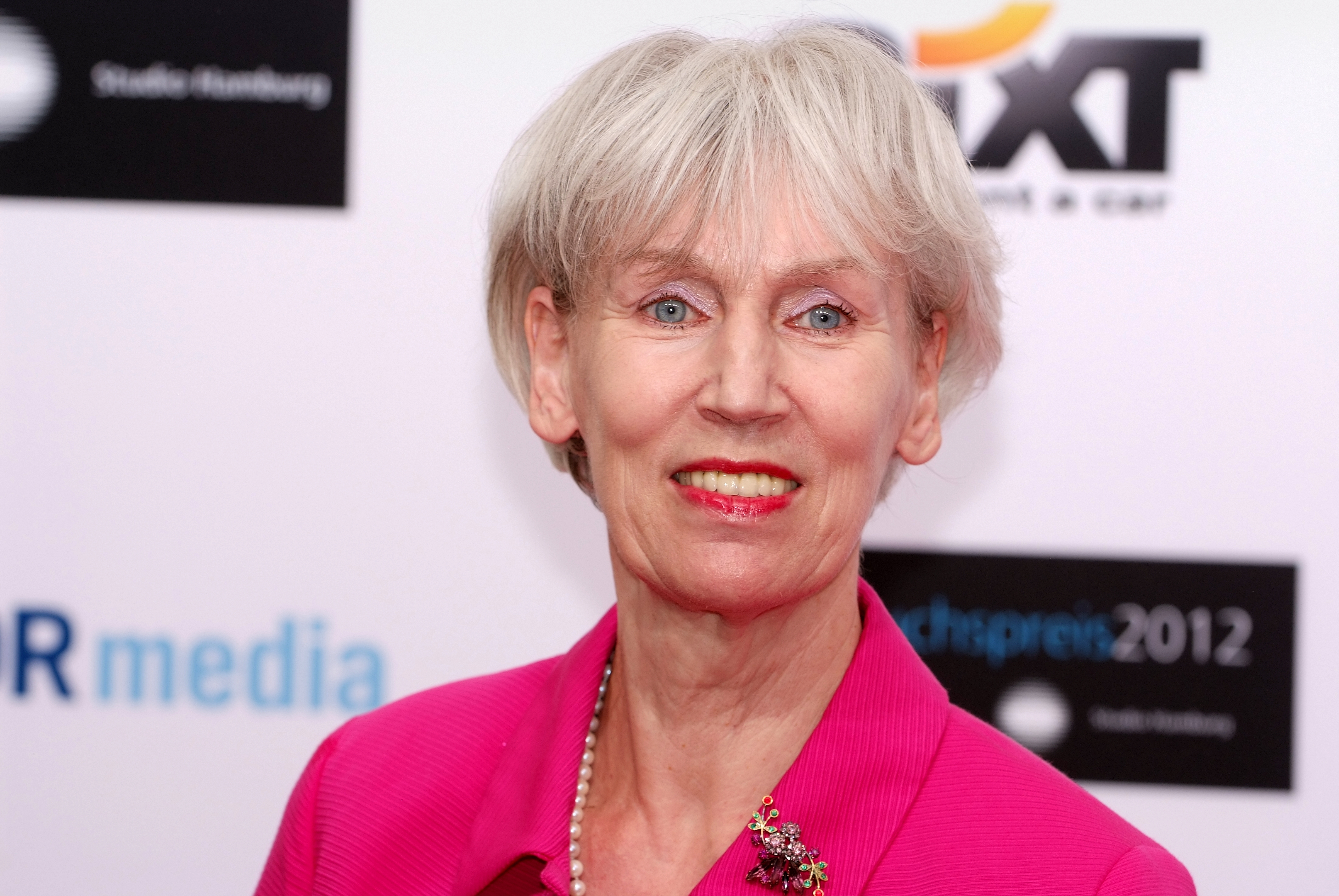 Studio Hamburg Nachwuchspreis 2012 Barbara Kisseler, Senatorin Kulturbehörde Hamburg